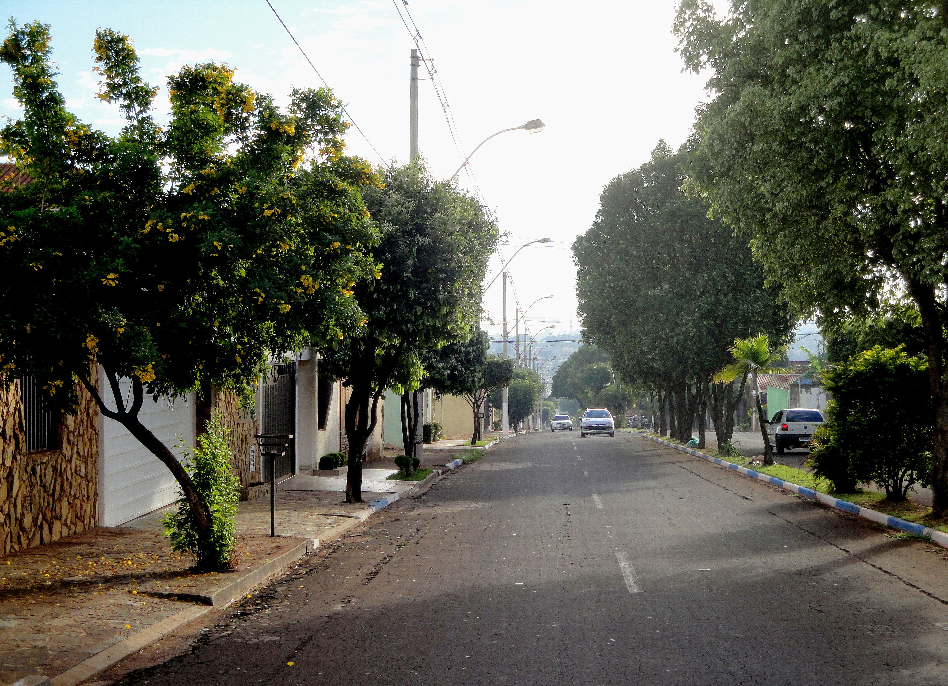 Avenida Eliseu Guerra em Sertãozinho, ao fundo a Usina Santo Antônio